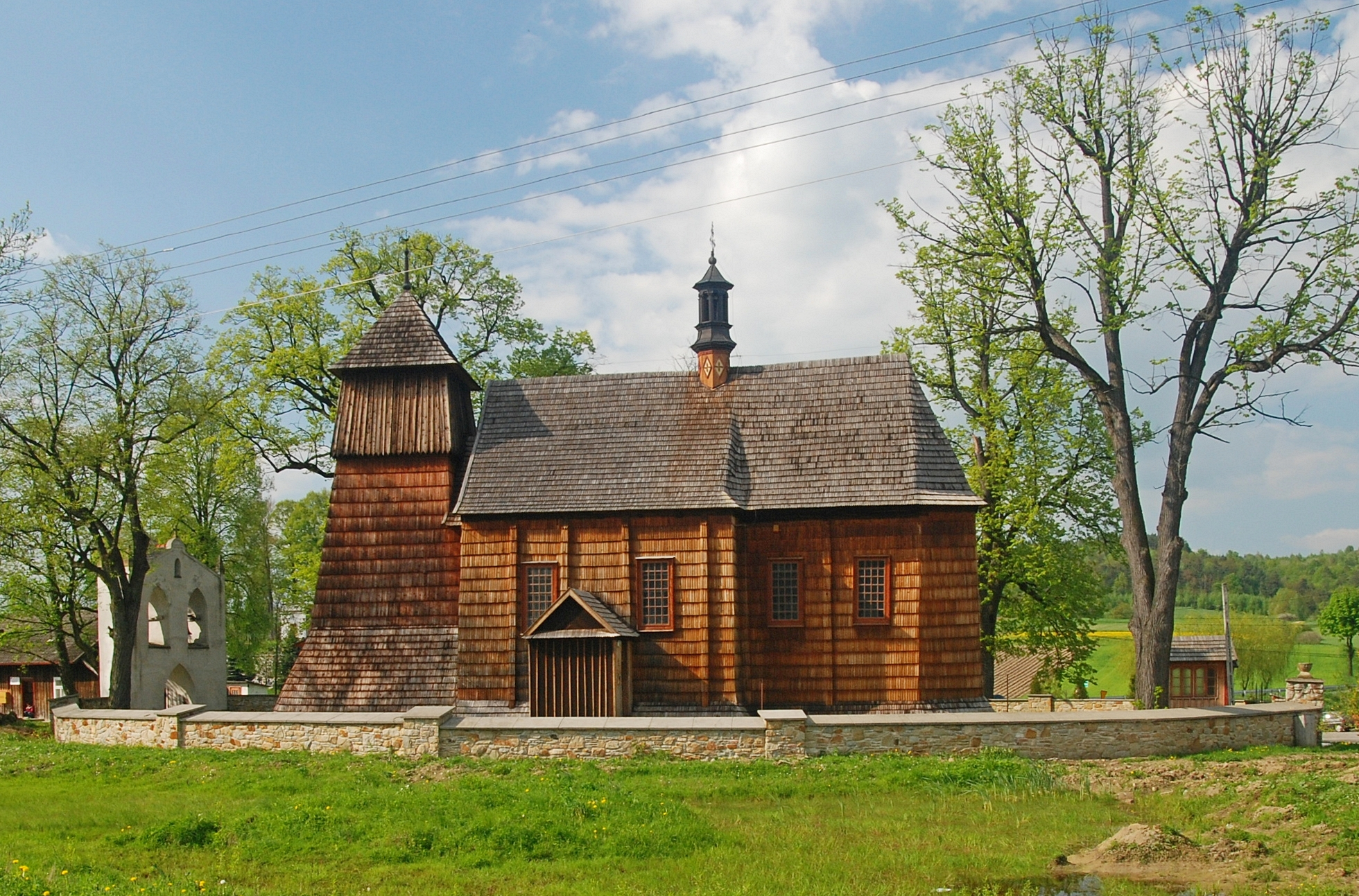 wieś Gogołów (województwo podkarpackie)